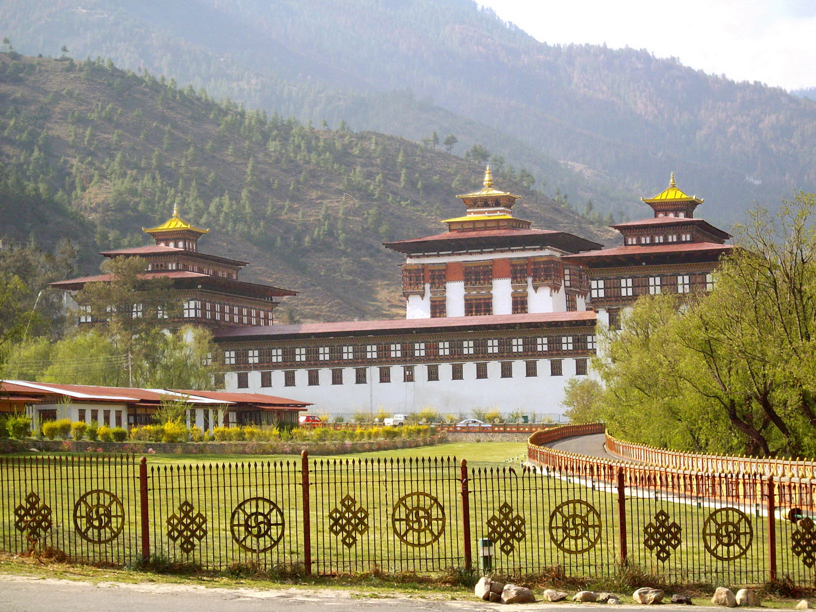 Thimphu, Bhutan